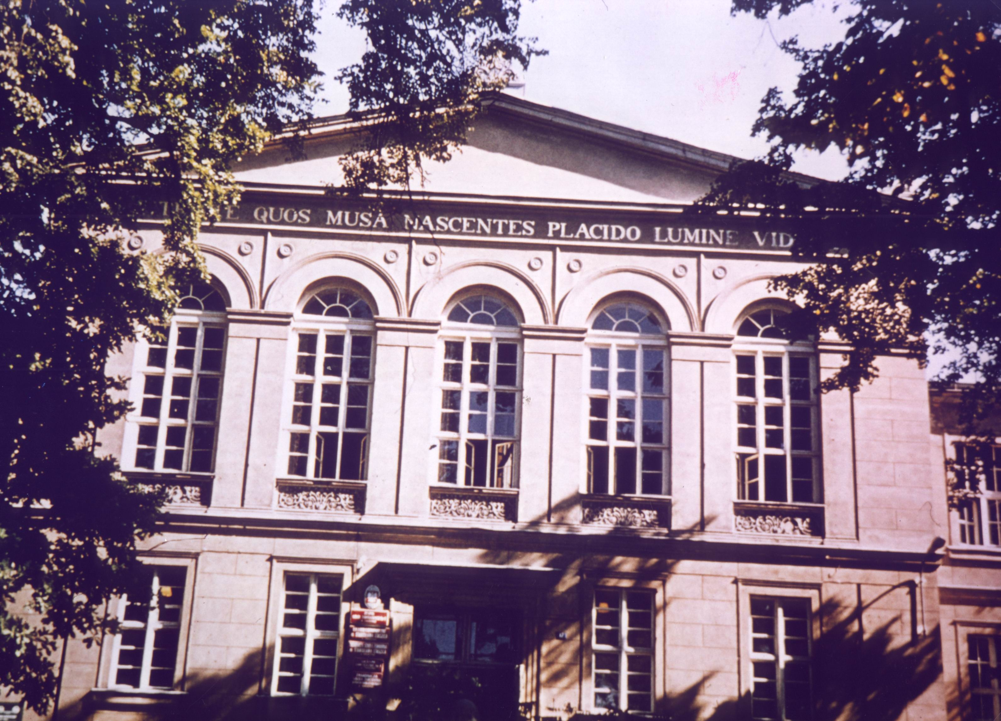 Mittelfront des Gymnasiums Marienwerder mit vergoldetem Motto: INTROITE QUOS MUSA NASCENTES PLACIDO LUMINE VIDERIT